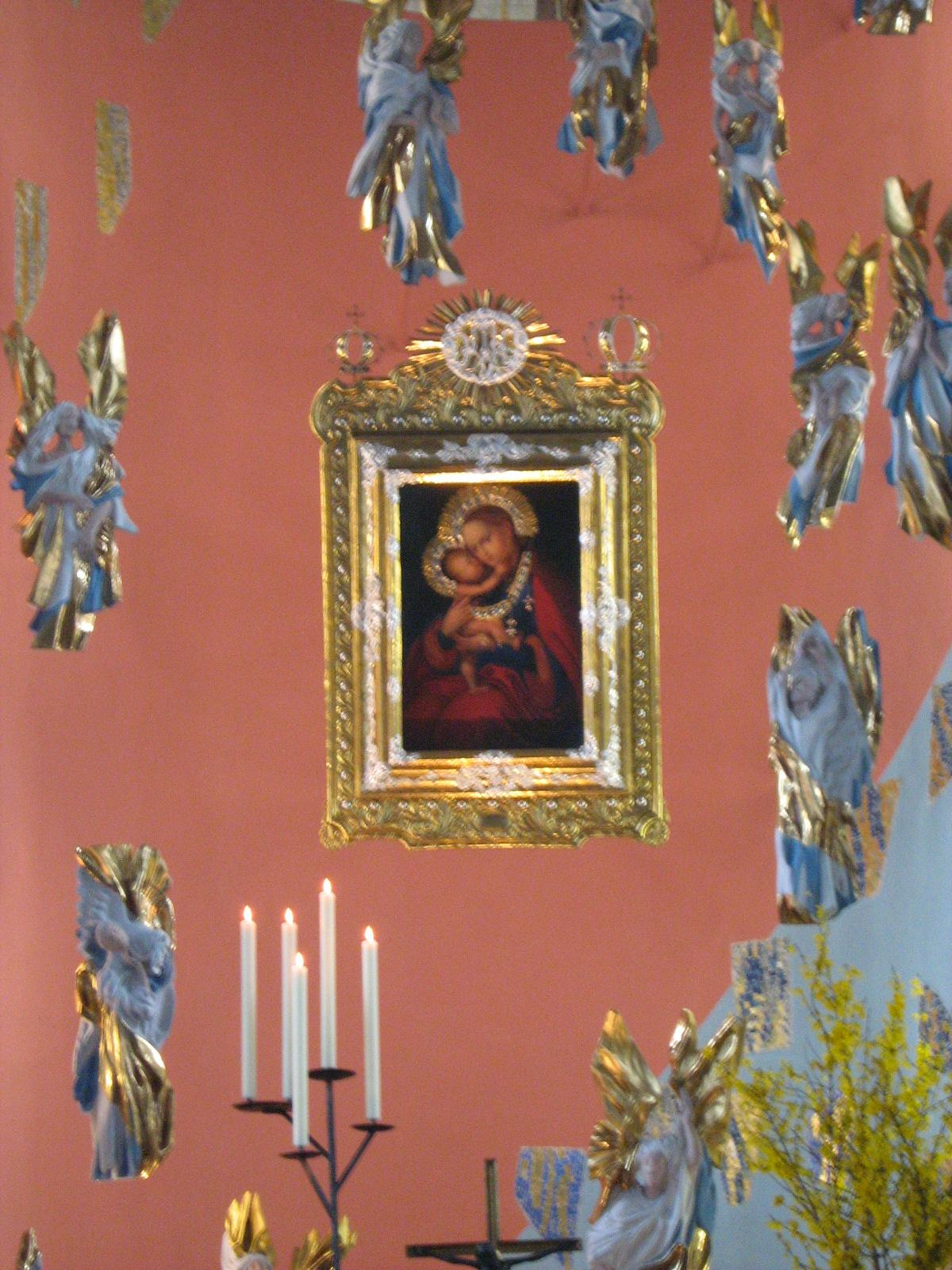 Zu Unserer Lieben Frau vom Kreuzberg in Schwandorf: Blick zum Altar mit dem Marienbild